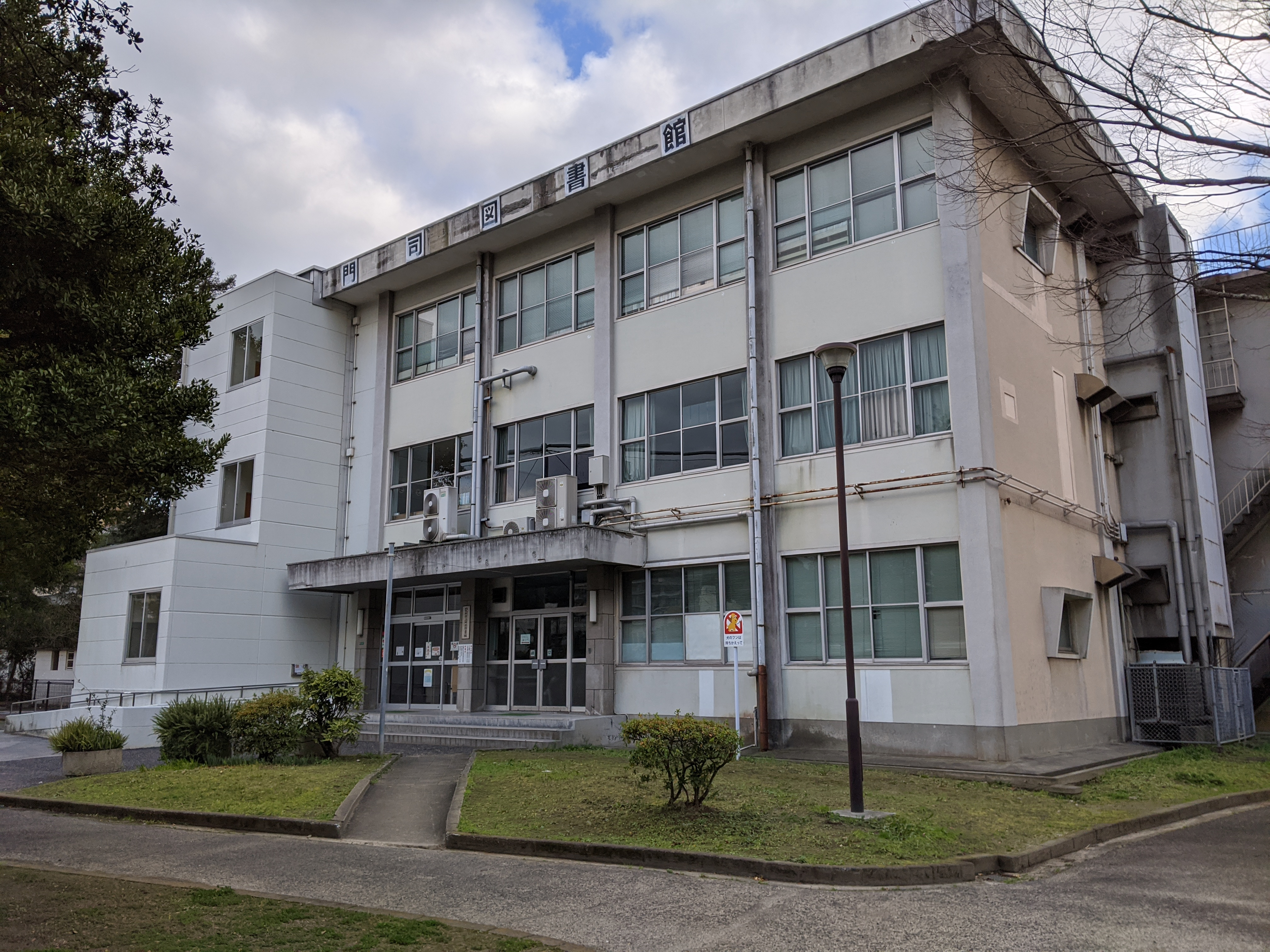 北九州市立門司図書館（老松公園内）